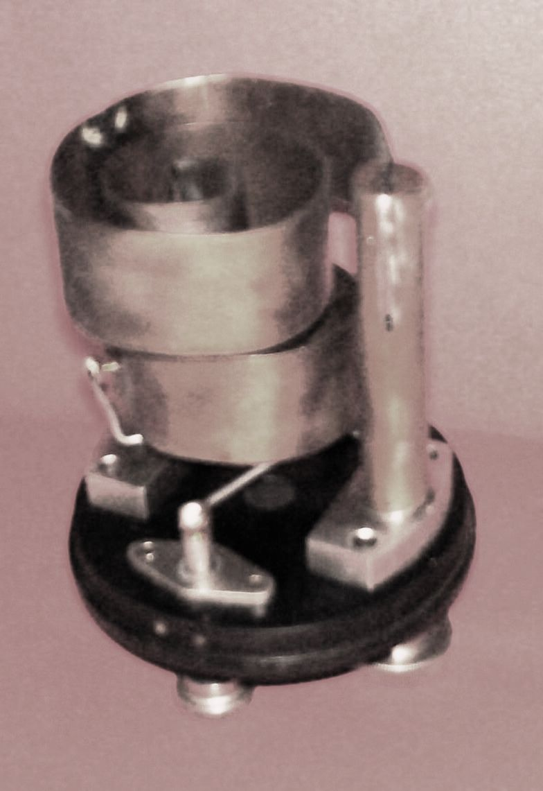 0,01 Ohmos normál-ellenállás kinyitva